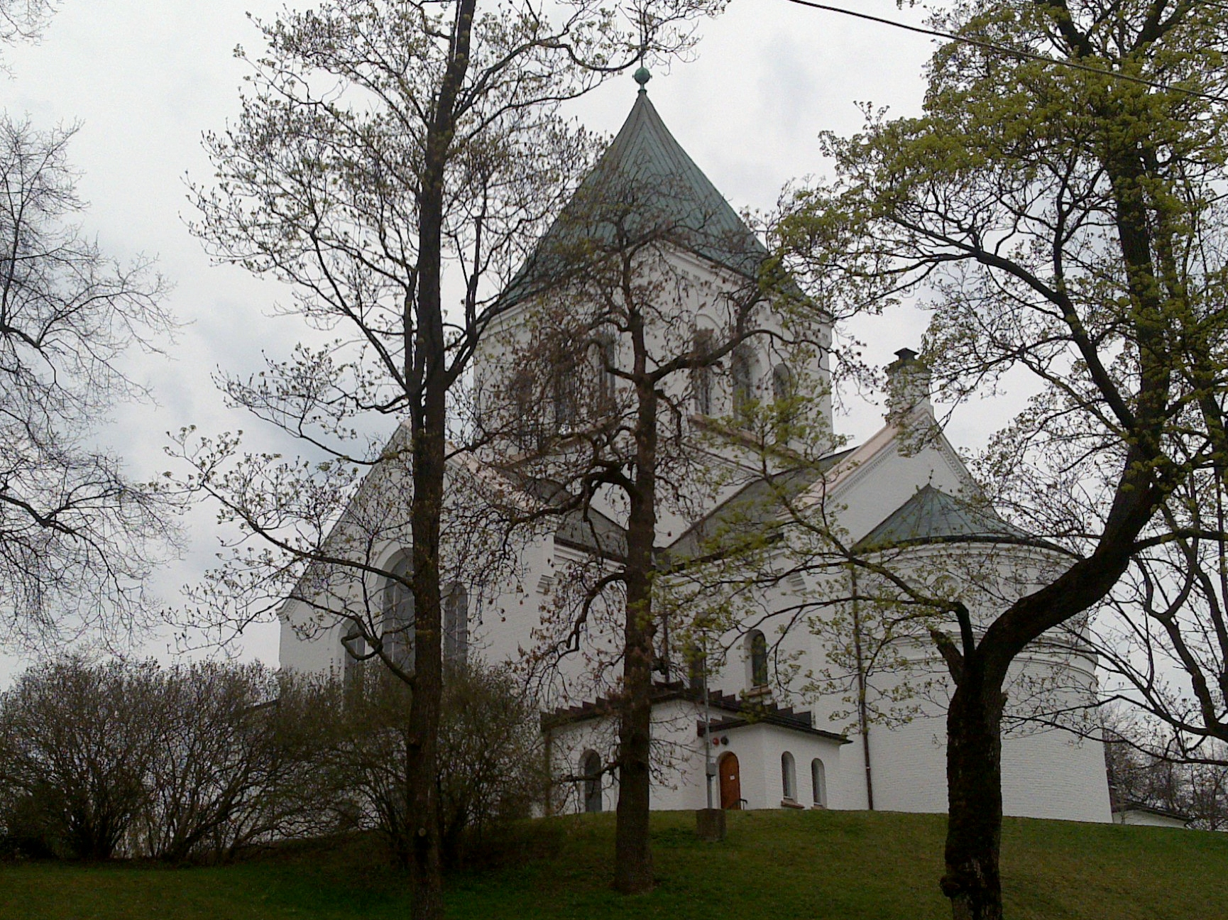 Ullern church, western Oslo, Norway